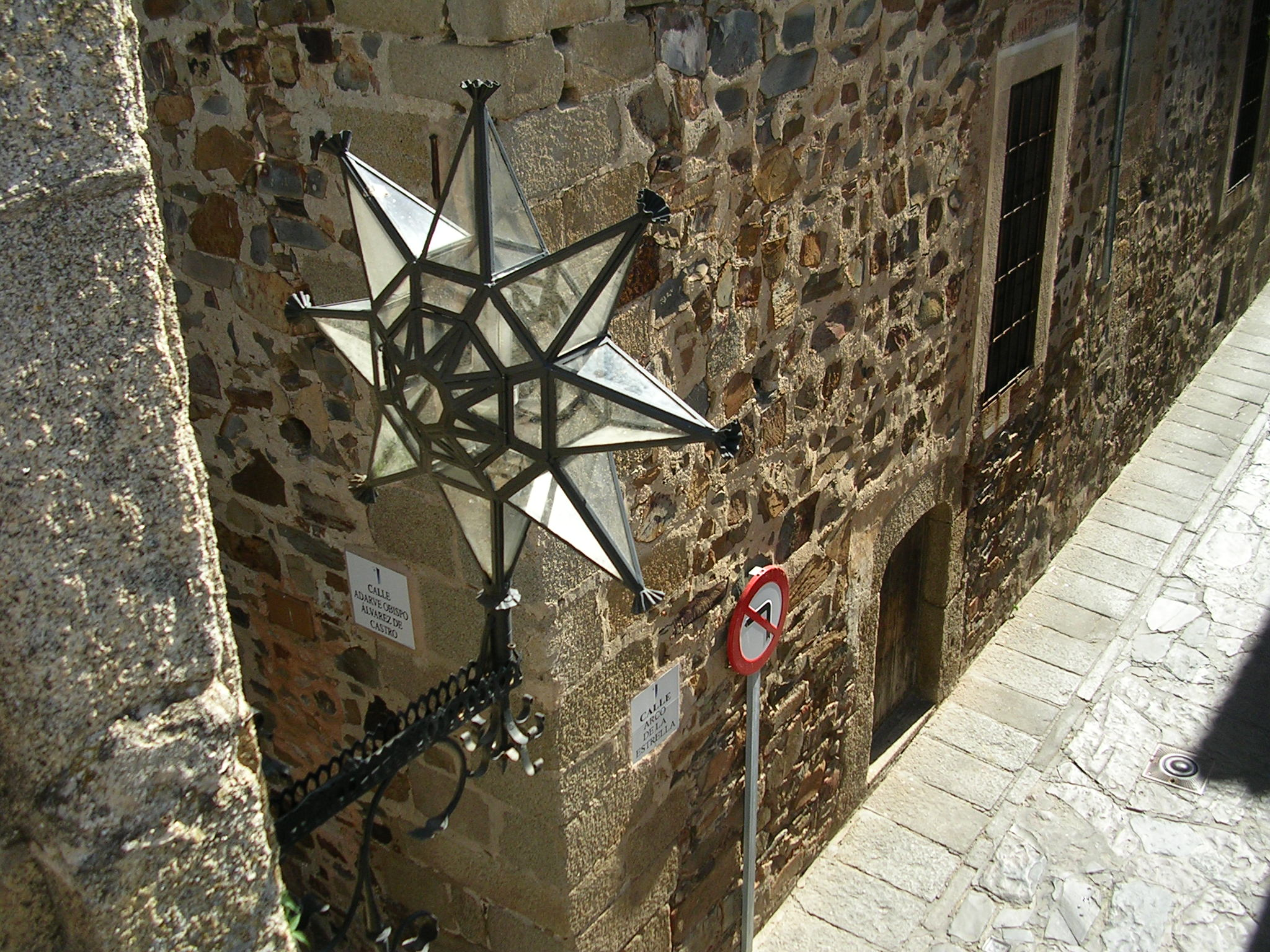 Vista del Arco de la Estrella desde la Torre Bujaco